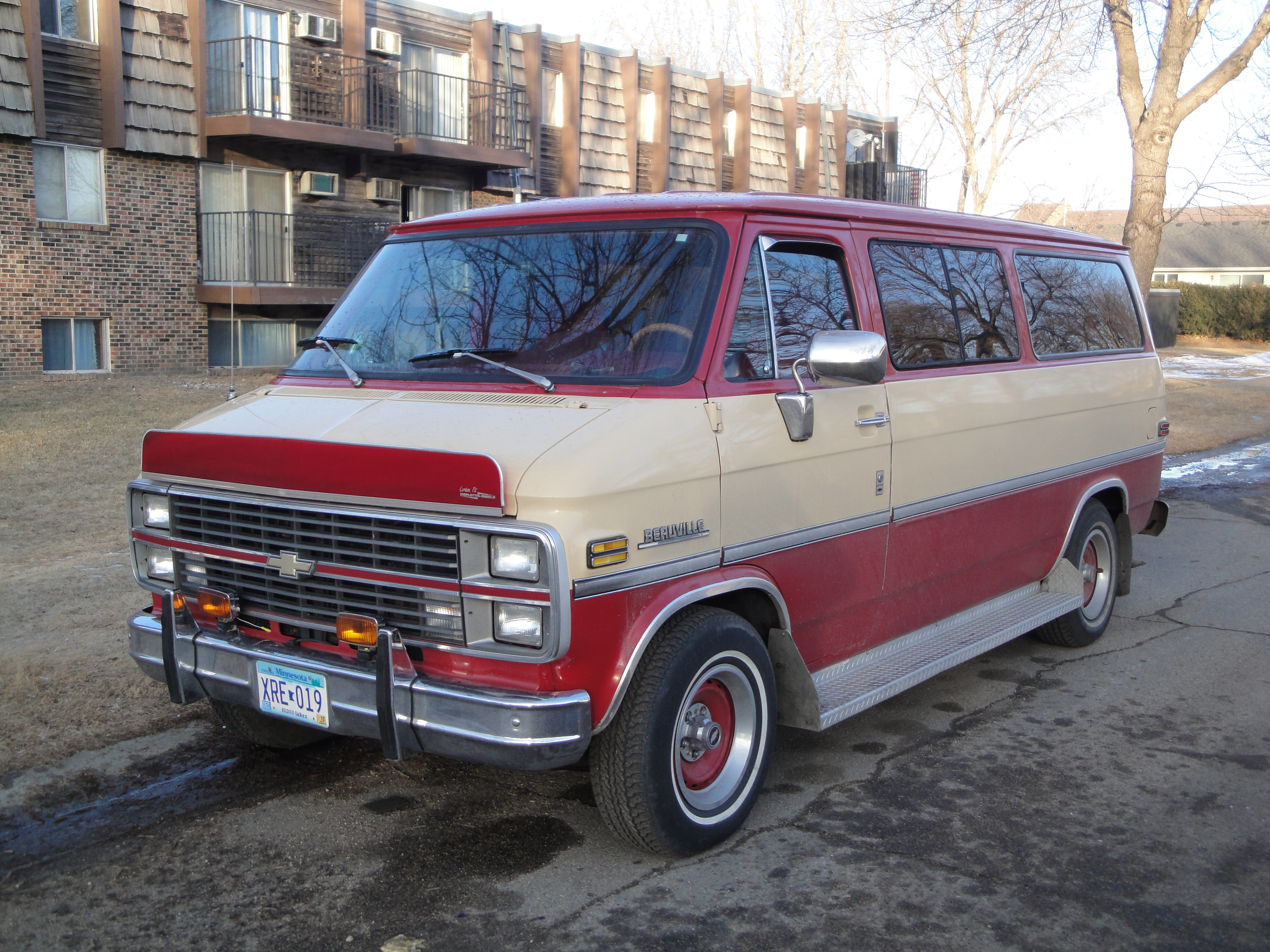 83 Chevrolet Beauville